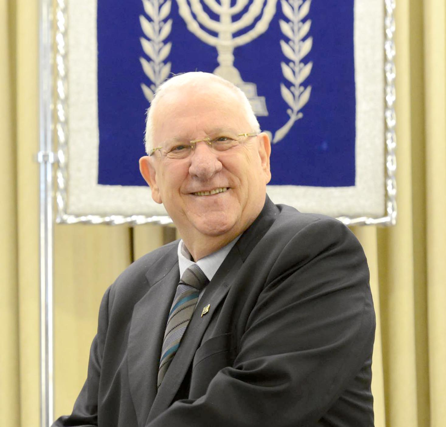 רב ניצב רוני אלשיך עם כניסתו לתפקיד מפכ״ל המשטרה בפגיה עם נשיא מדינת ישראל ראובן ריבלין